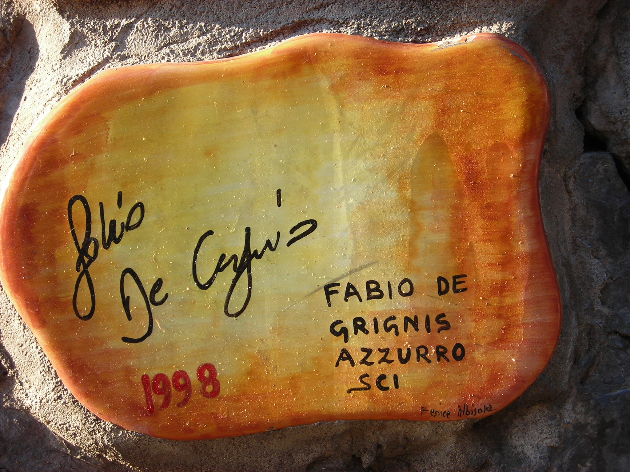 Piastrella del Muretto di Alassio autografata da Fabio de Grignis